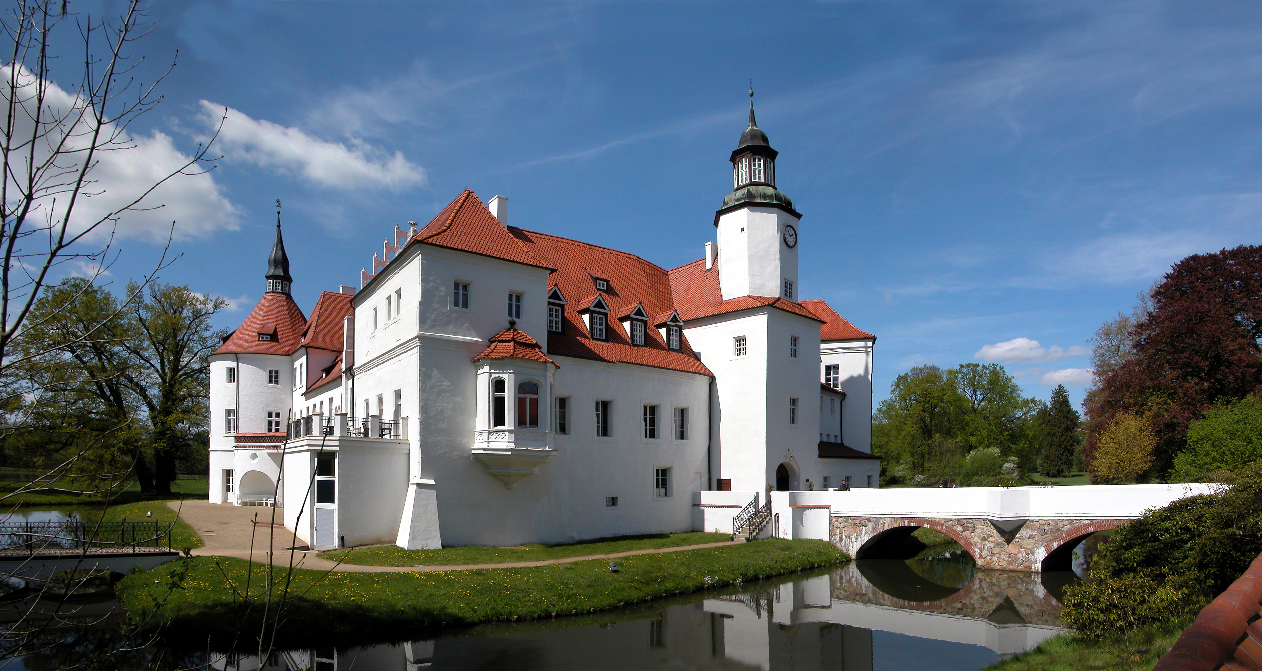 29.04.2015 15926 Fürstlich Drehna (zu Luckau): Wasserschloß. Ursprünglich eine slawische Burg. 1521 übernahmen die Herren von Minckwitz die Herrschaft Drehna. Sie ließen nach 1550 das Schloß neu erbauen. 1697 erwarb die Familie von Promnitz die Herrschaft. Hierfür steht die heute noch erhaltene barocke Westseite. Seit 1807, als der damalige Schlossherr Moritz Graf Lynar in den Fürstenstand erhoben wurde, heißen Ort und Schloß Fürstlich Drehna. 1877 ging die Herrschaft an die Bremer Reederfamilie Wätjen über. Nach dem II. WK wurde das Schloss enteignet und als Jugendwerkhof genutzt. Bedroht von den herannahenden Braunkohlebaggern, war es lange dem Verfall preis- gegeben. Von 2006 bis 2007 wurde es saniert und für eine Nutzung als Hotel umgebaut. [DSCN5064&5065&5066&5067&5068&5069.JPG]20150429300MDR.JPG(c)Blobelt